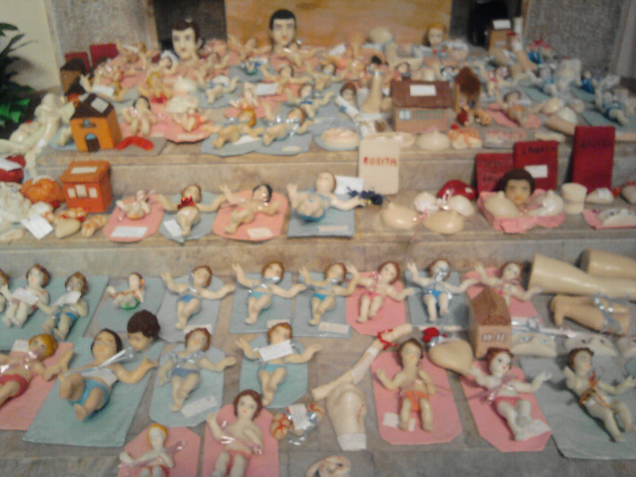 Ex voto di cera offerti per la Festa di San Rocco